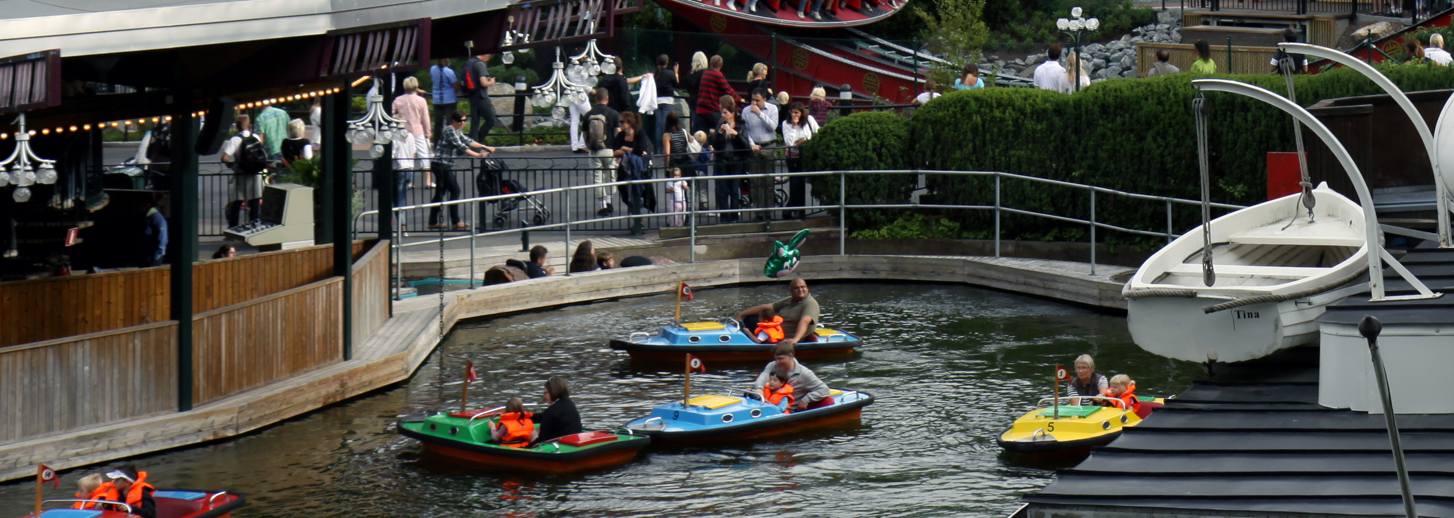 Barnbåtarna på Liseberg i juli 2009.